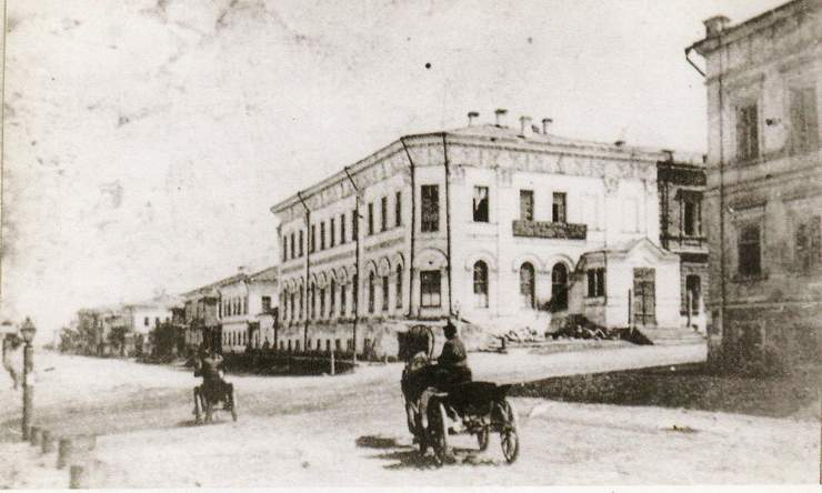 Дом купца Мекке (~1880)